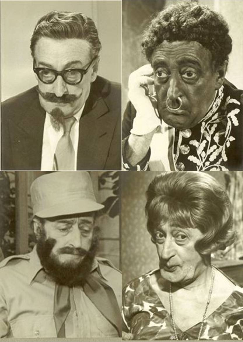 Totò nel film "Tototruffa '62"